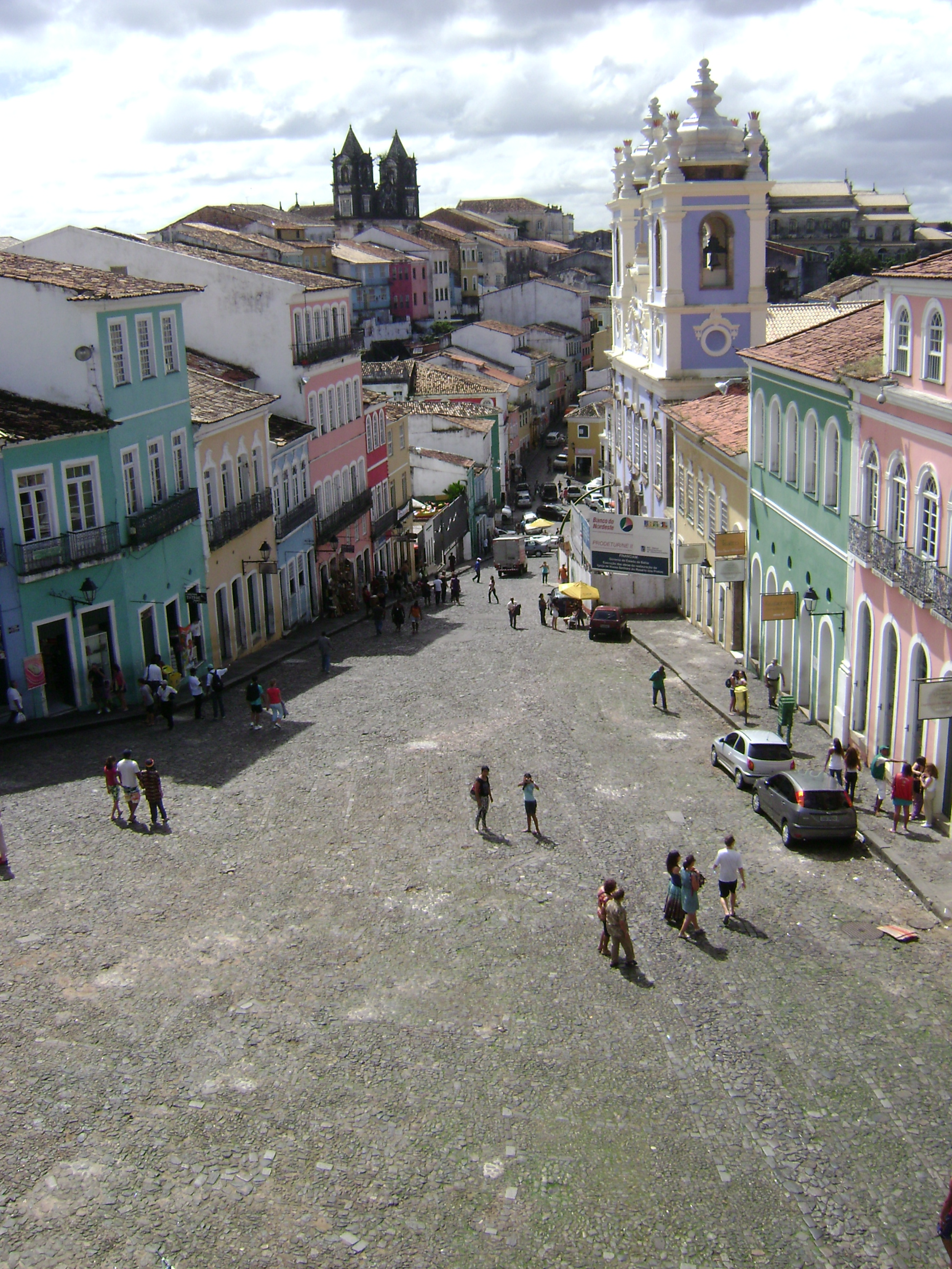 Largo do Pelourinho, em Salvador, Bahia, Brasil.